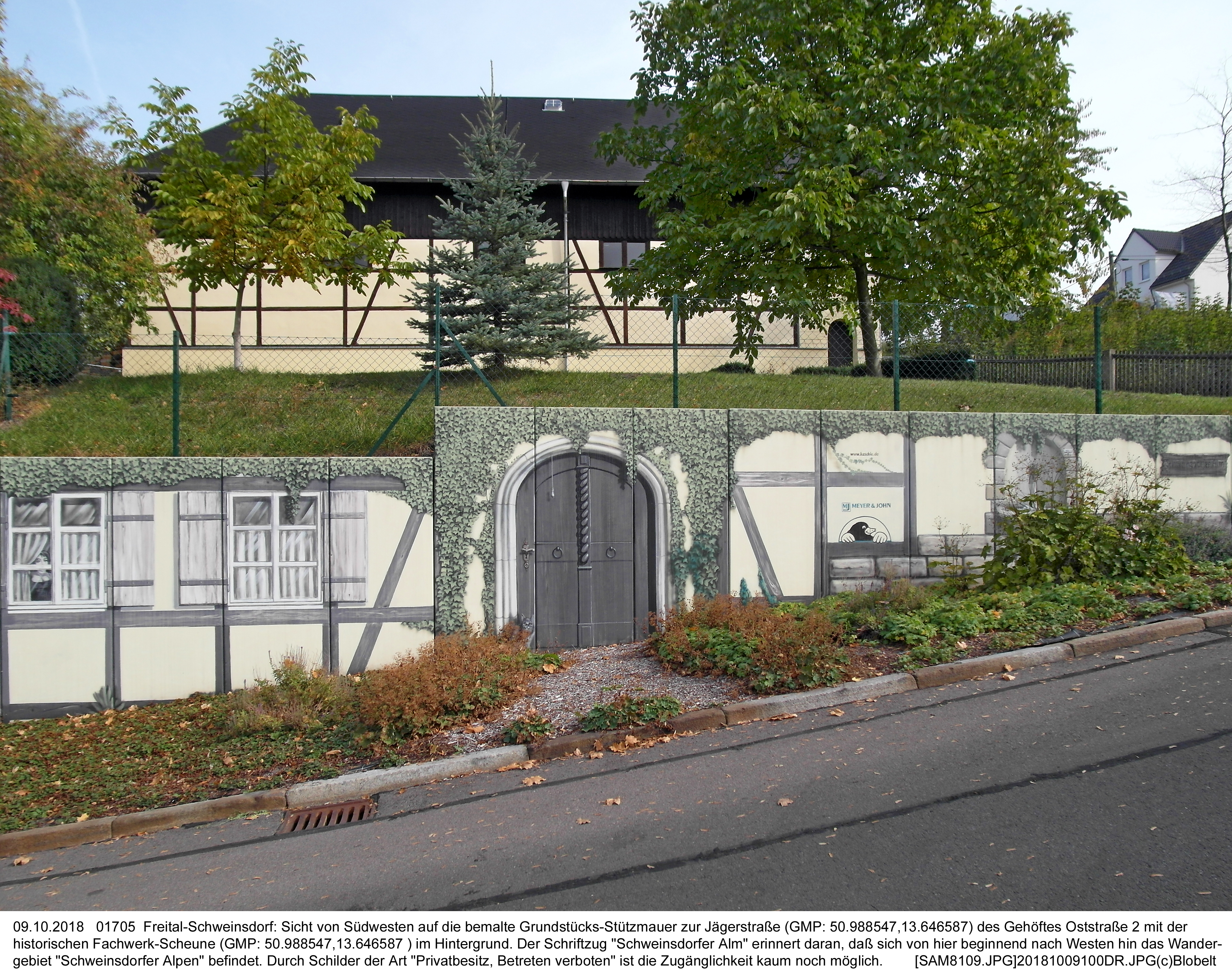 09.10.2018 01705 Freital-Schweinsdorf: Sicht von Südwesten auf die bemalte Grundstücks-Stützmauer zur Jägerstraße (GMP: 50.988547,13.646587) des Gehöftes Oststraße 2 mit der historischen Fachwerk-Scheune (GMP: 50.988547,13.646587 ) im Hintergrund. Der Schriftzug "Schweinsdorfer Alm" erinnert daran, daß sich von hier beginnend nach Westen hin das Wandergebiet "Schweinsdorfer Alpen" befindet. Durch Schilder der Art "Privatbesitz, Betreten verboten" ist die Zugänglichkeit kaum noch möglich. [SAM8109.JPG]20181009100DR.JPG(c)Blobelt